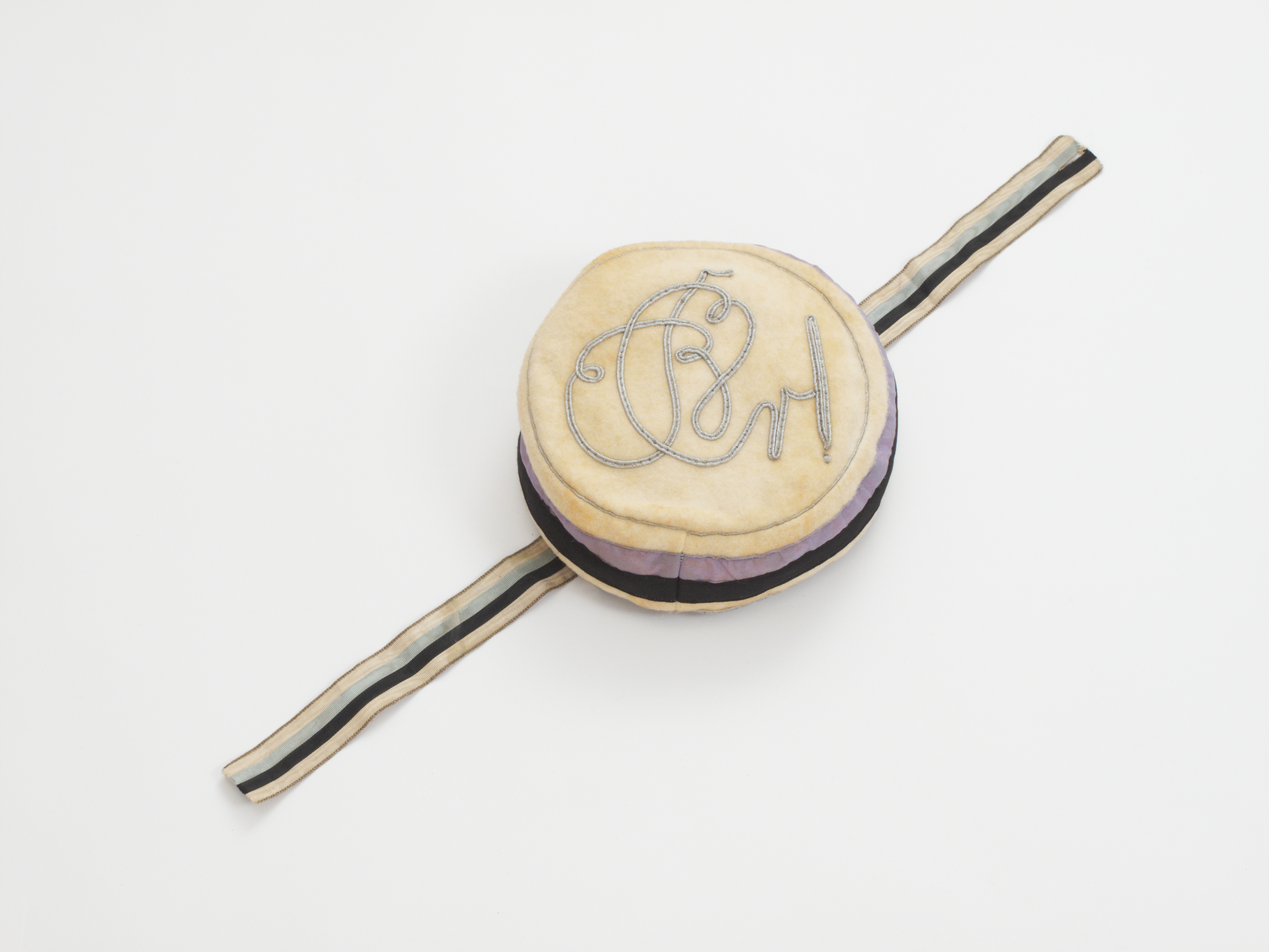 Band und Tönnchen eines Angehörigen des Königsberger Corps Baltia (1851-1934)